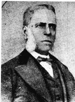 Felix Ballester, Fundador del Partido de Gral San Martín.